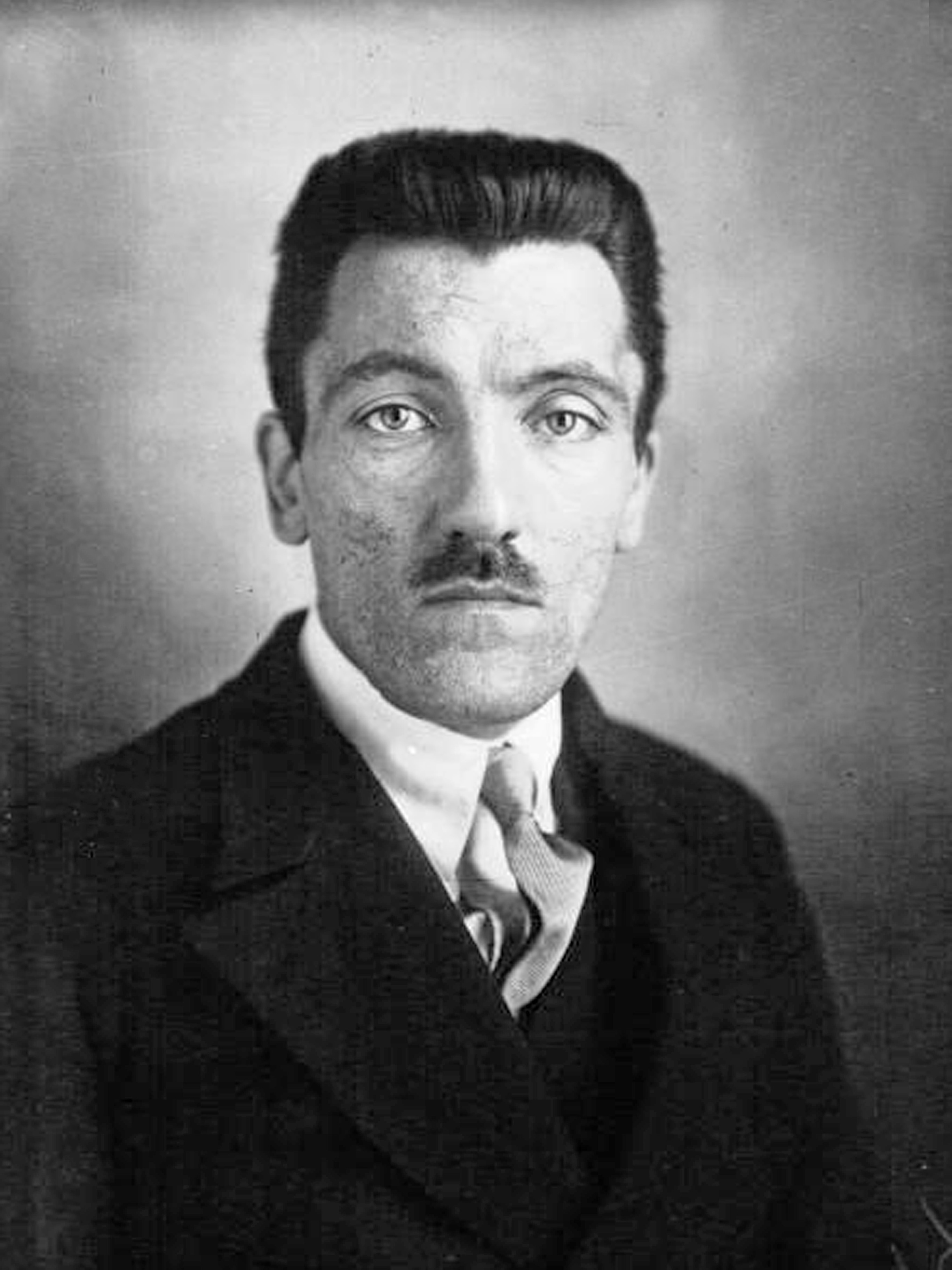 Charles Spinasse, député (Corrèze) [photographie de presse]